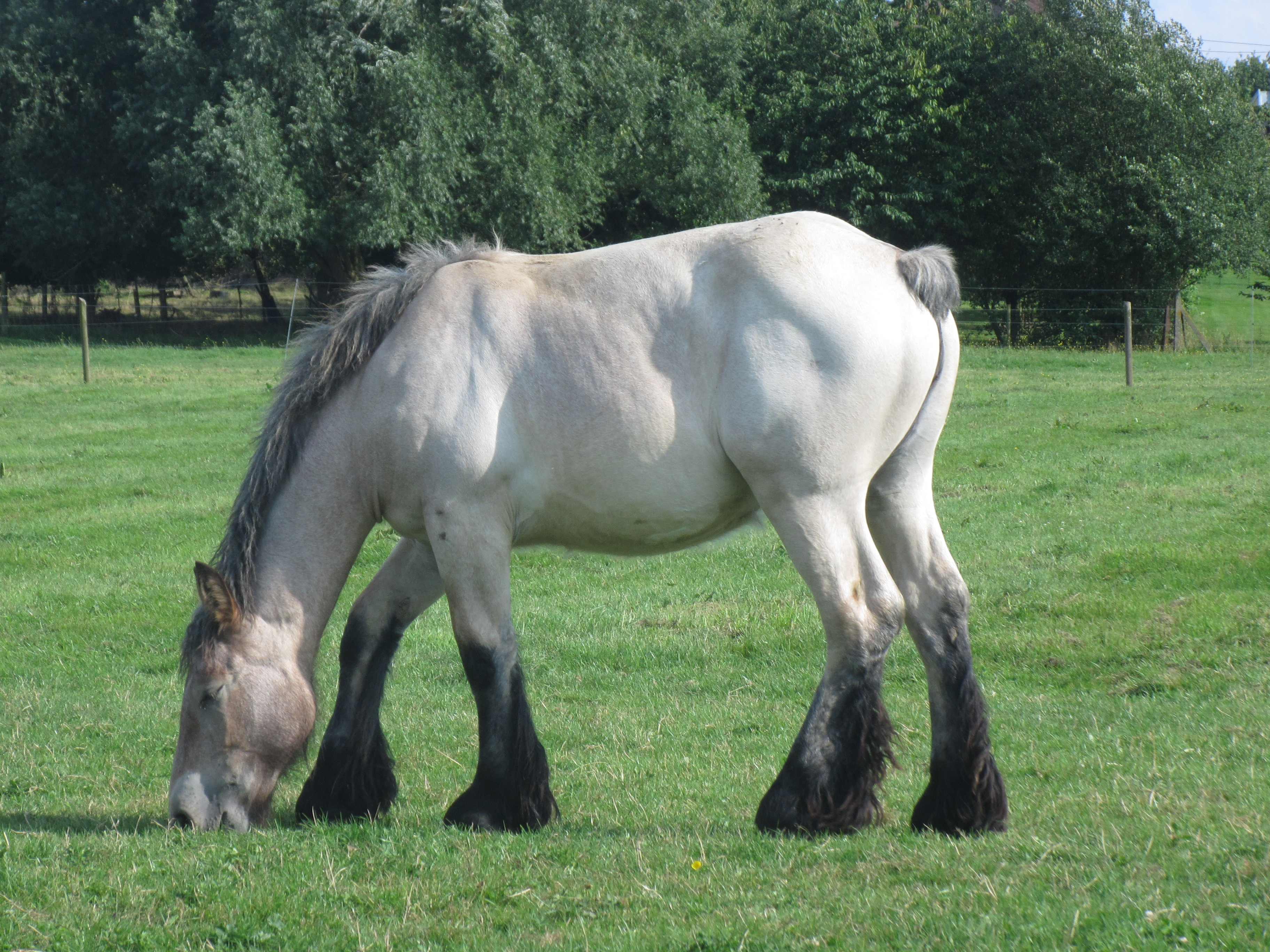 Brabants Trekpaard in de wei langs de Nanovestraat